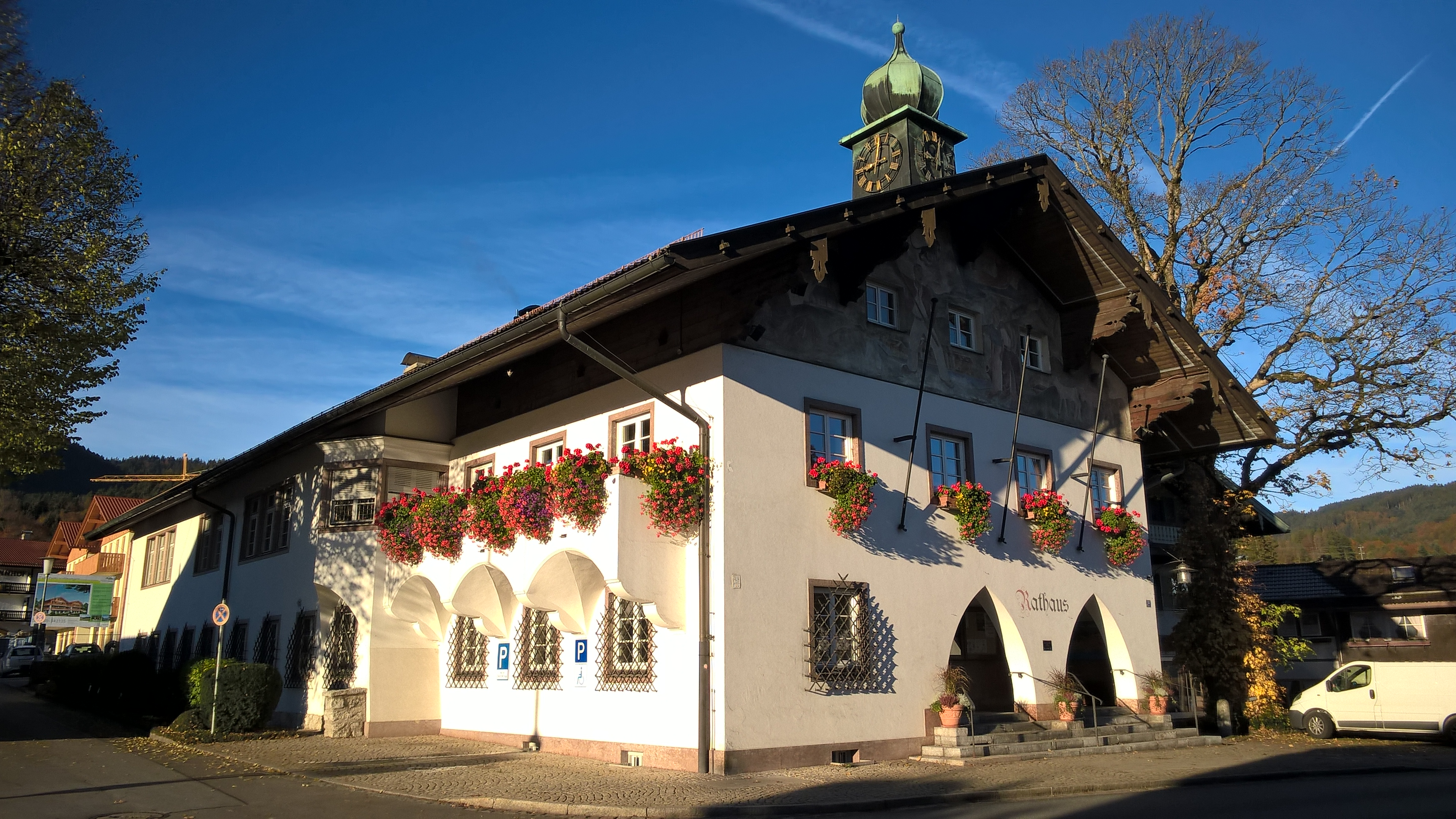 Rathaus in Bad Wiessee; zweigeschossiger Flachsatteldachbau mit Dachreiter, offenen Erdgeschossarkaden, südseitiger Altane und Fassadenmalereien, im reduzierten Heimatstil, 1930/31 von Hermann Lang, 1979/80 westliche ErweiterungThis is a photograph of an architectural monument.